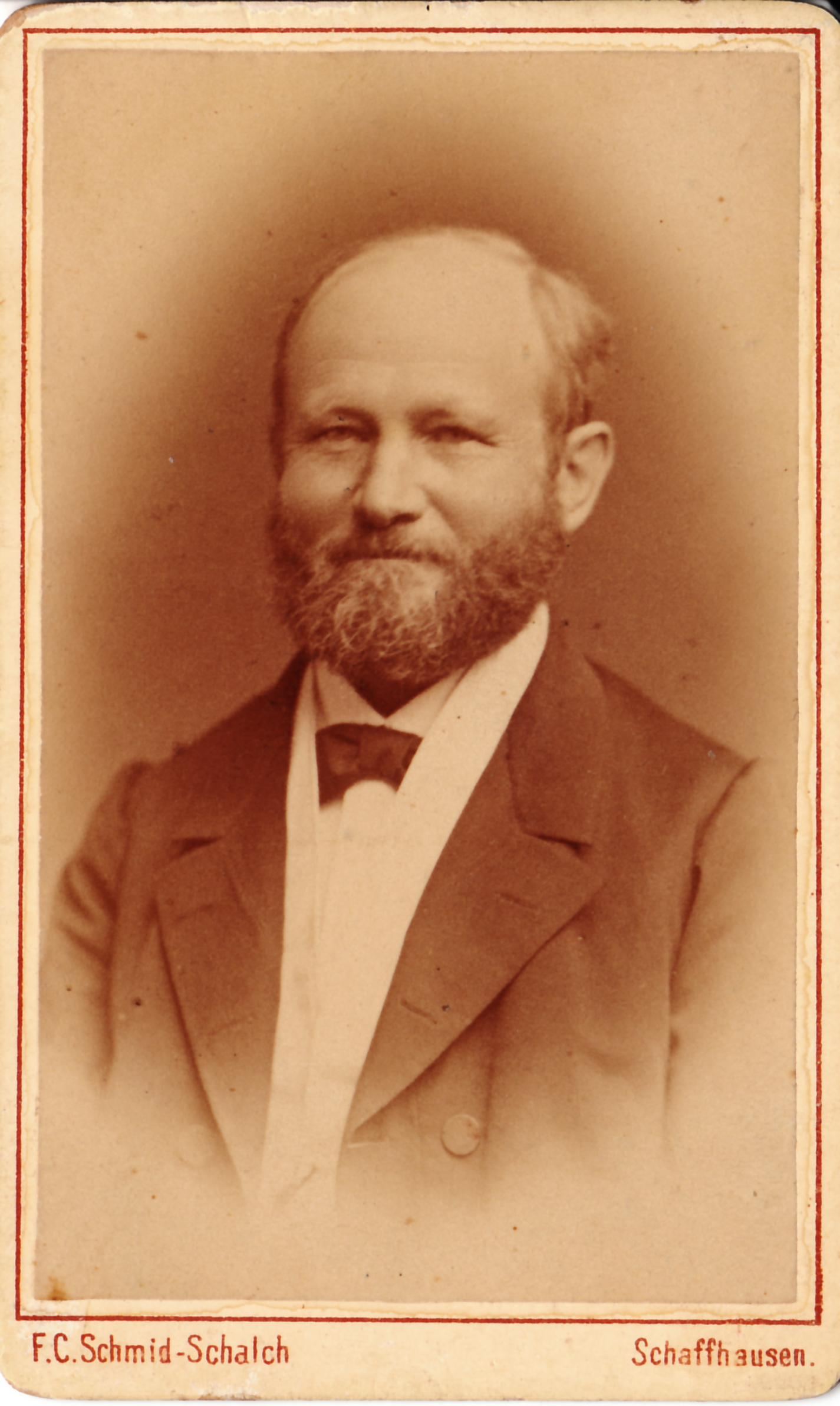 Porträt des schweizerischen Sprachwissenschaftlers Dr. Friedrich Staub (1826–1896), Gründer und Chefredaktor des Schweizerischen Idiotikons sowie (Leitender) Bibliothekar an der Stadtbibliothek Zürich